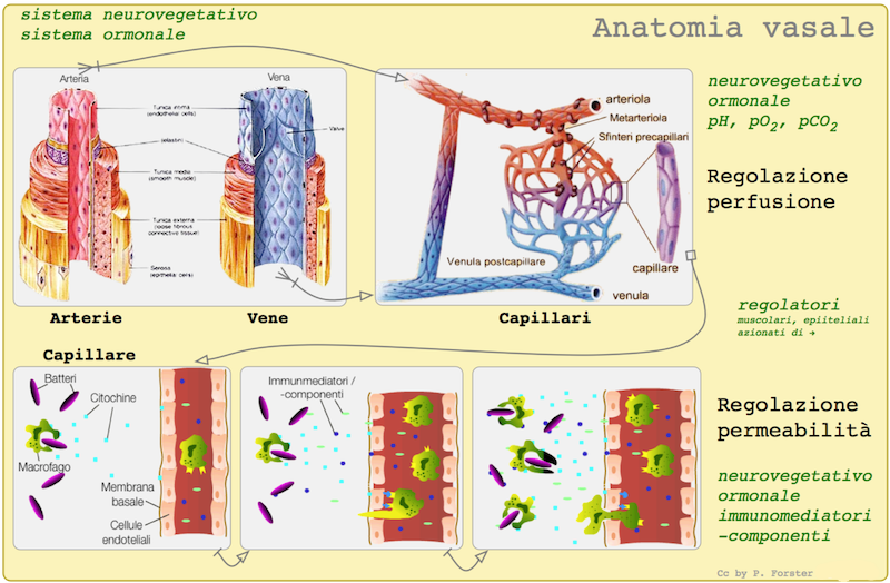 anatomia di arterie, vene e capillari, fisiologia perfusione, permeabilità, regolazione dei vasi